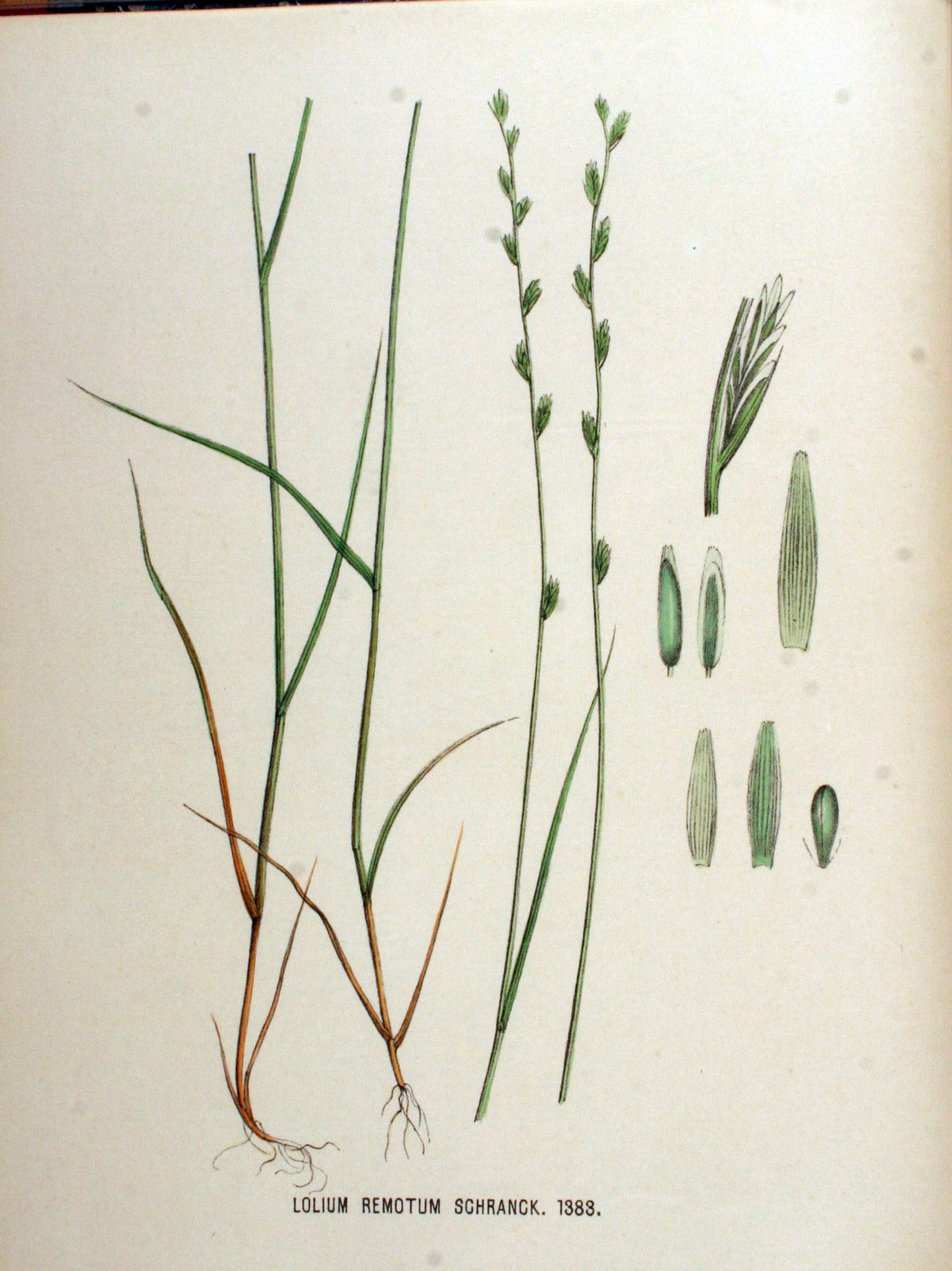 Lolium remotum Schrank (Syn. Lolium linicola A. Braun)